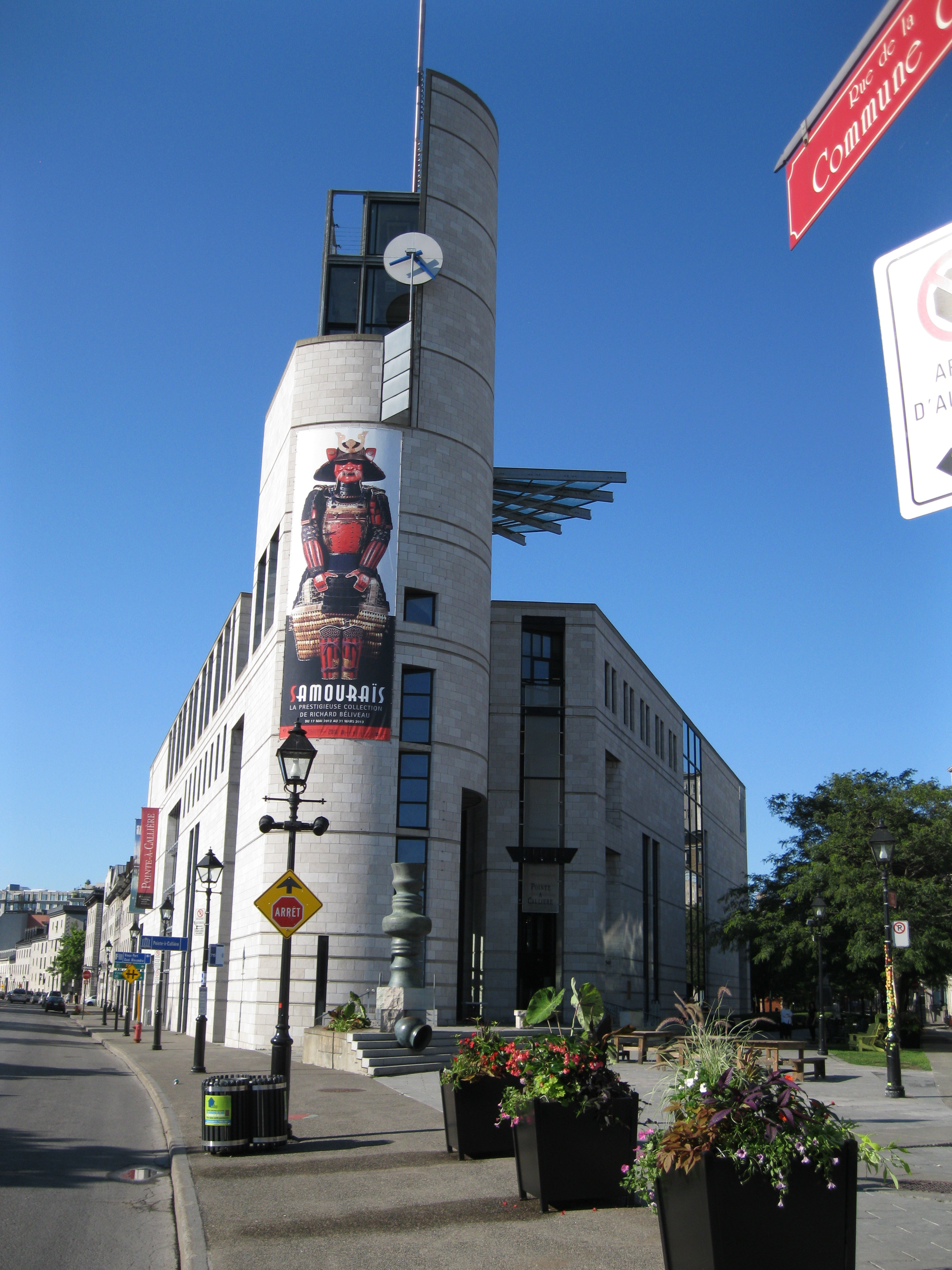 L'Éperon de Pointe-à-Callière, Montréal